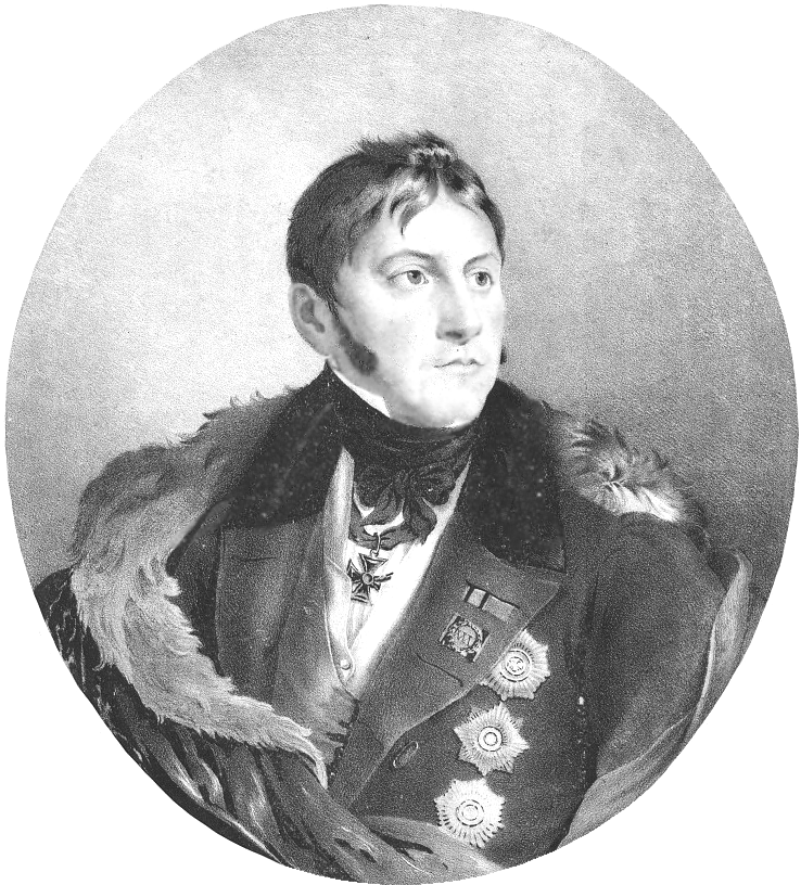 Ksawery Kossecki